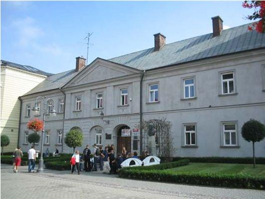 I Liceum Ogólnokształcące im. ks. Stanisława Konarskiego w Rzeszowie